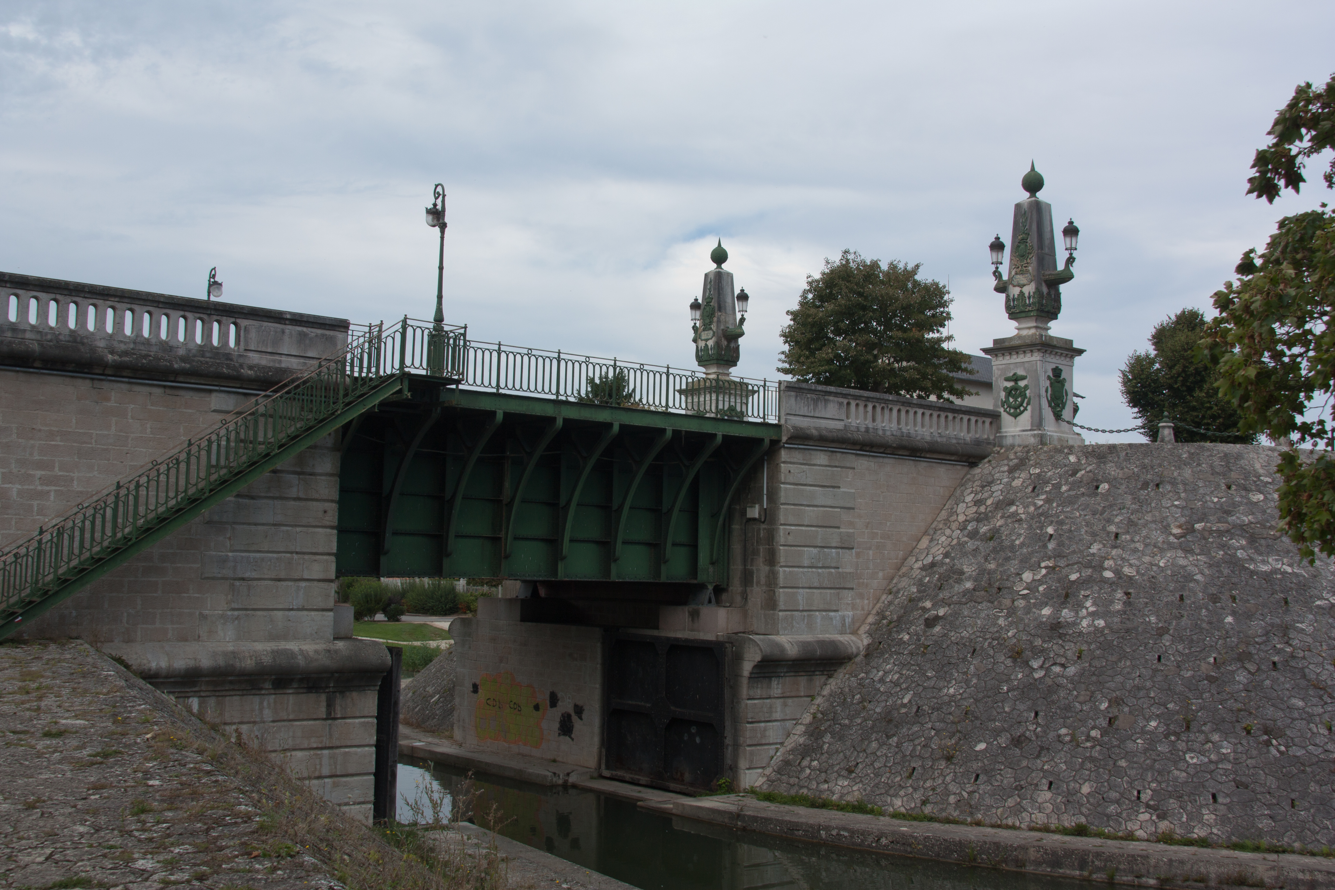 Le pont-canal de Briare, Loiret, France.